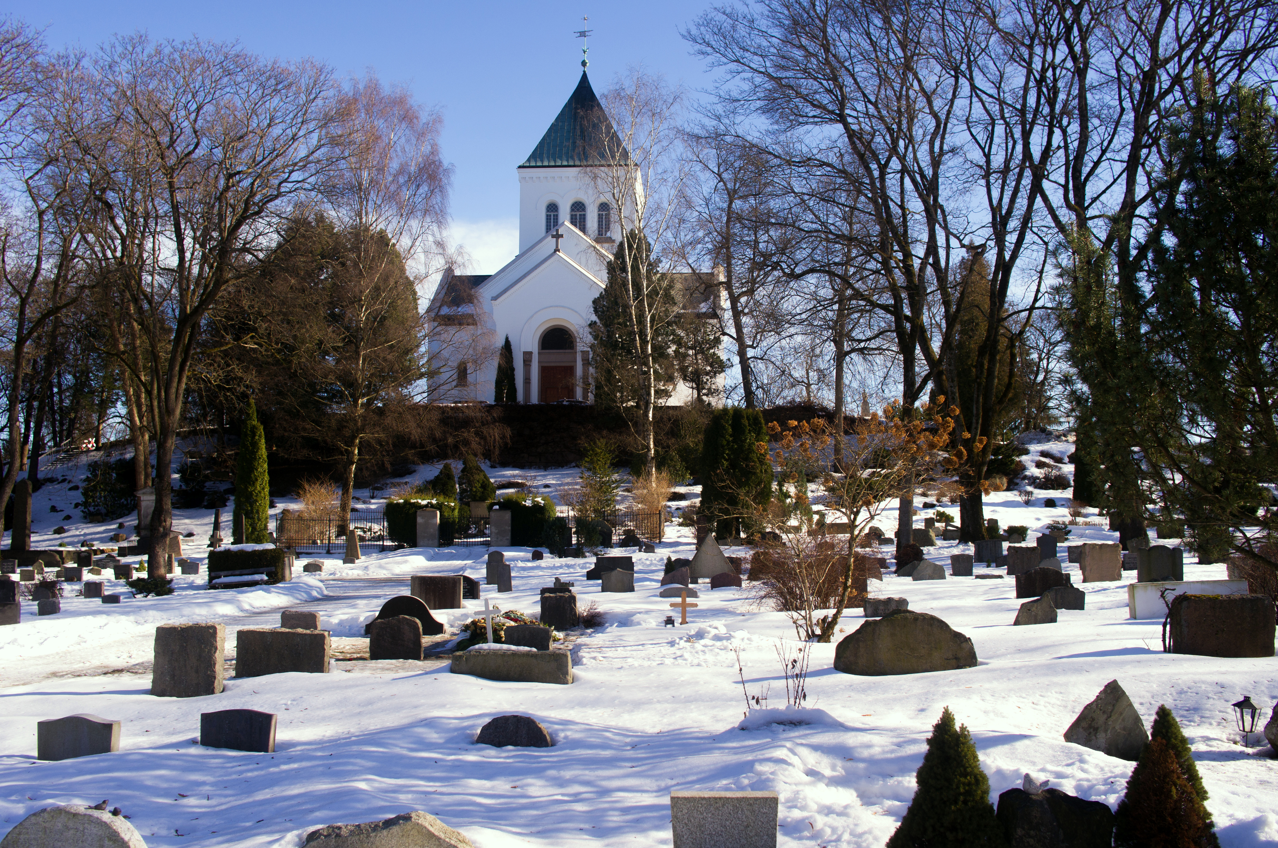 Ullern, Oslo, Norway